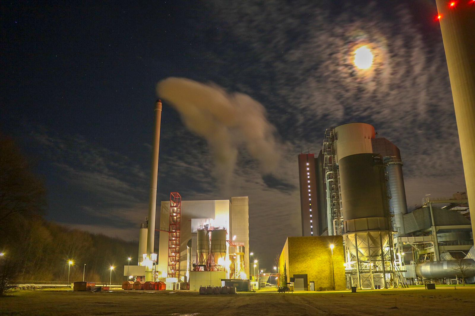 Kraftwerk Zolling: Biomasseheizkraftwerk (links) und Steinkohleblock (rechts)